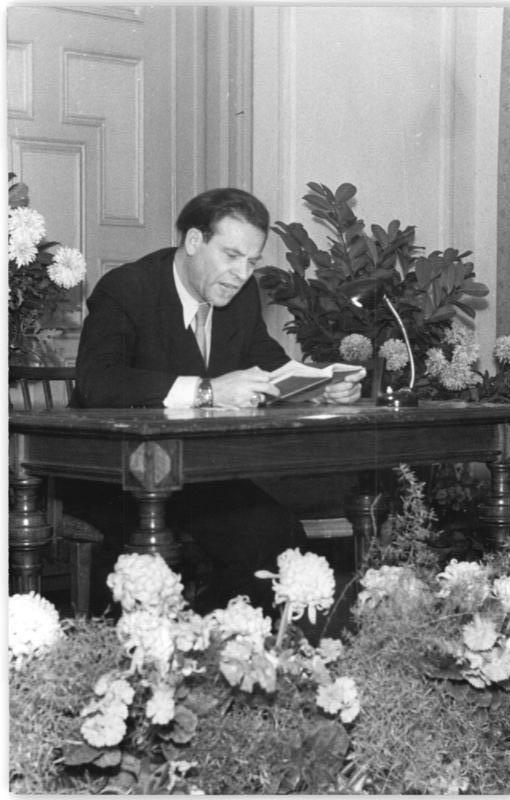 Illus-Köhler Kno-Bl. 25.11.1950 Feier zum 50. Geburtstag von Anna Seghers. Am 24.11.1950 fand im Kulturbundhaus in Berlin eine Feier zum 50. Geburtstag der Schriftstellerin Anna Seghers statt. UBz: Harry Hindemith las aus Werken von Anna Seghers.